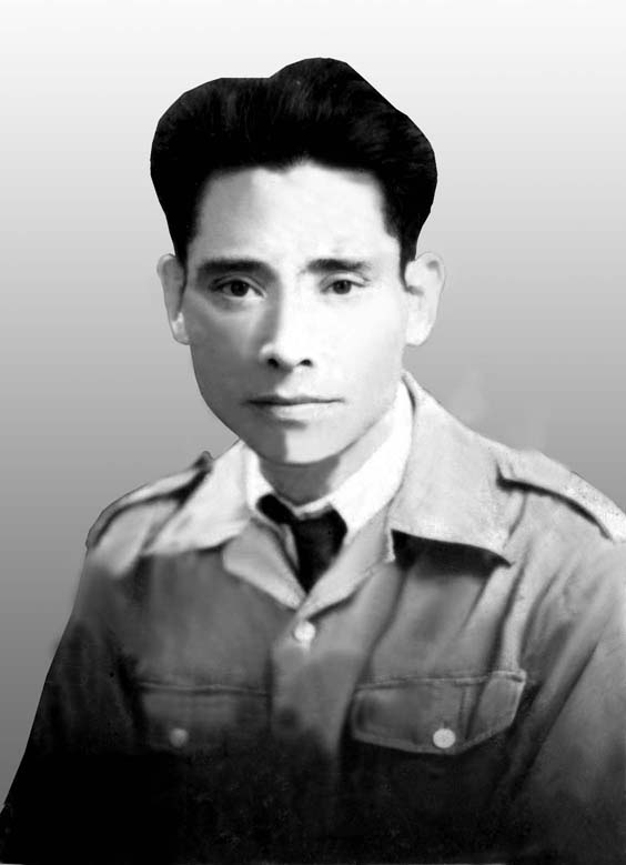 Chân dung Thiếu tướng Quân đội Nhân dân Việt Nam: Nguyễn Sơn (1908-1956)[1].